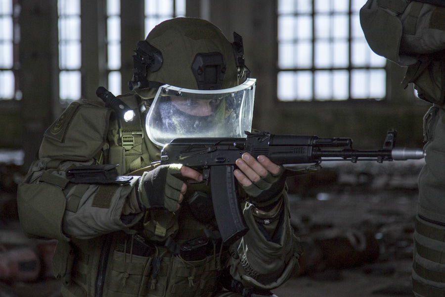 Практическая тренировка подразделений штурма и разграждения 1-й гвардейской моторизованной инженерной бригады ВС РФ